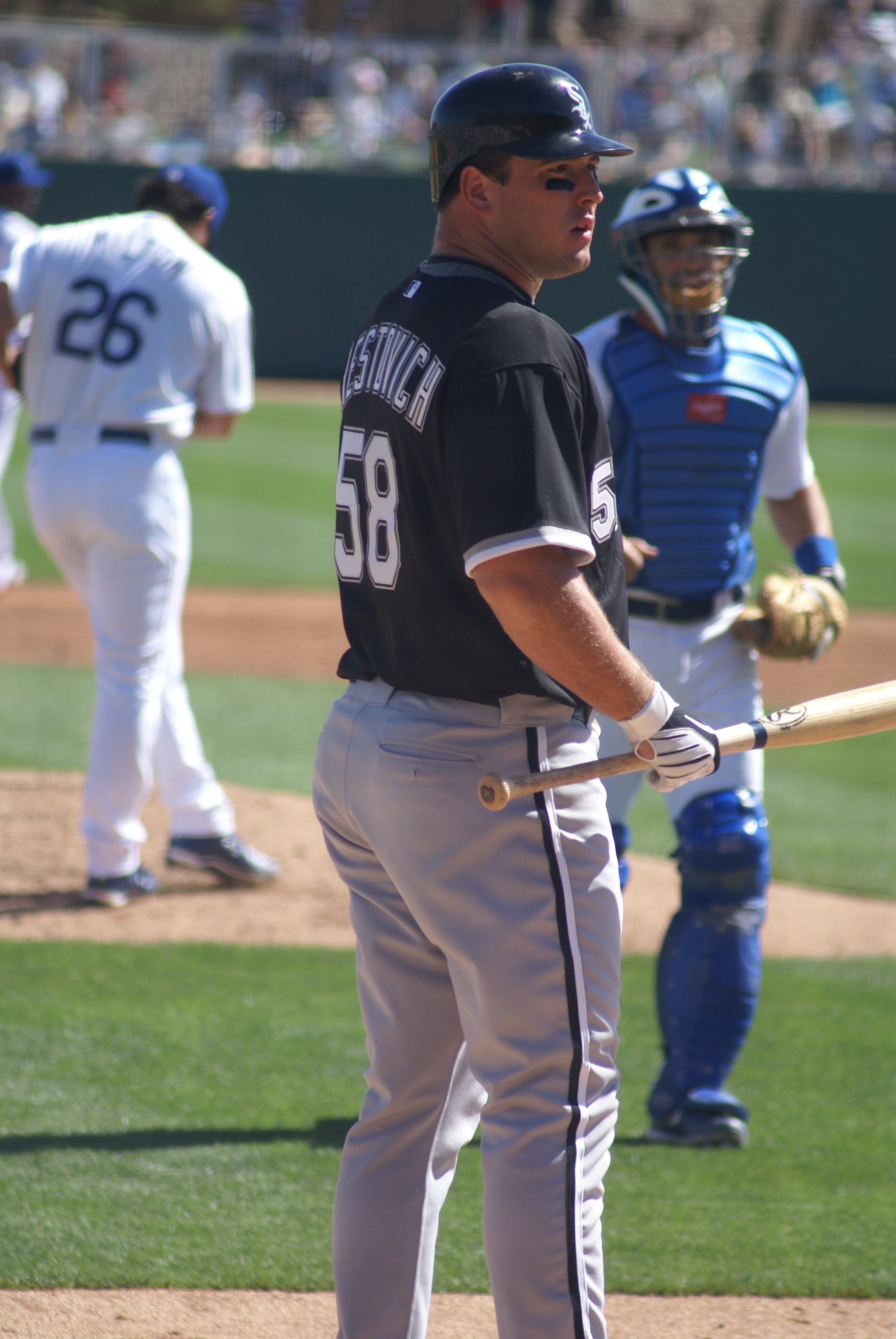 Michael Restovich